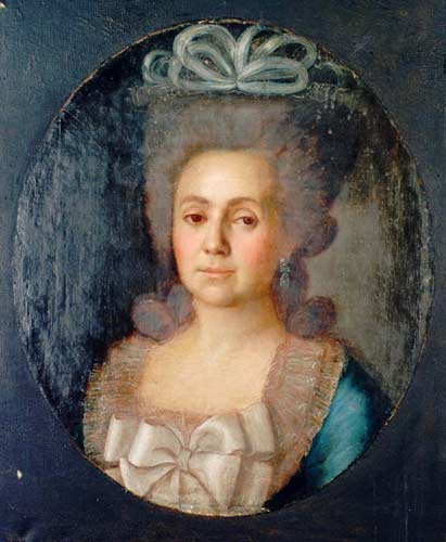 П.С. Дрождин. 1745-1805. Портрет княгини Е.Р. Дашковой. 1770-е годы . Новосибирская картинная галерея